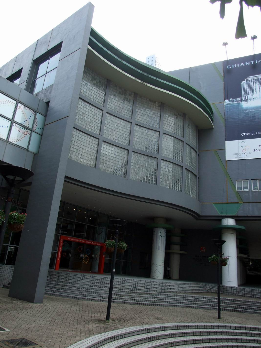 香港公園體育館